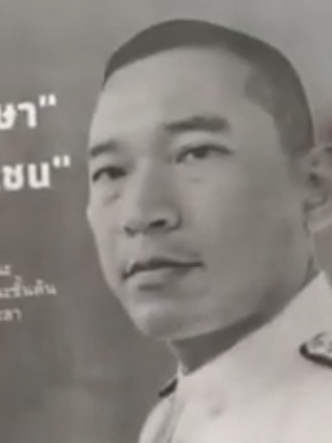 08/03/2020 นศ.มช.จุดเทียนไว้อาลัยส่งวิญญาณผู้พิพากษา“คณากร"หวังไม่ตายฟรี